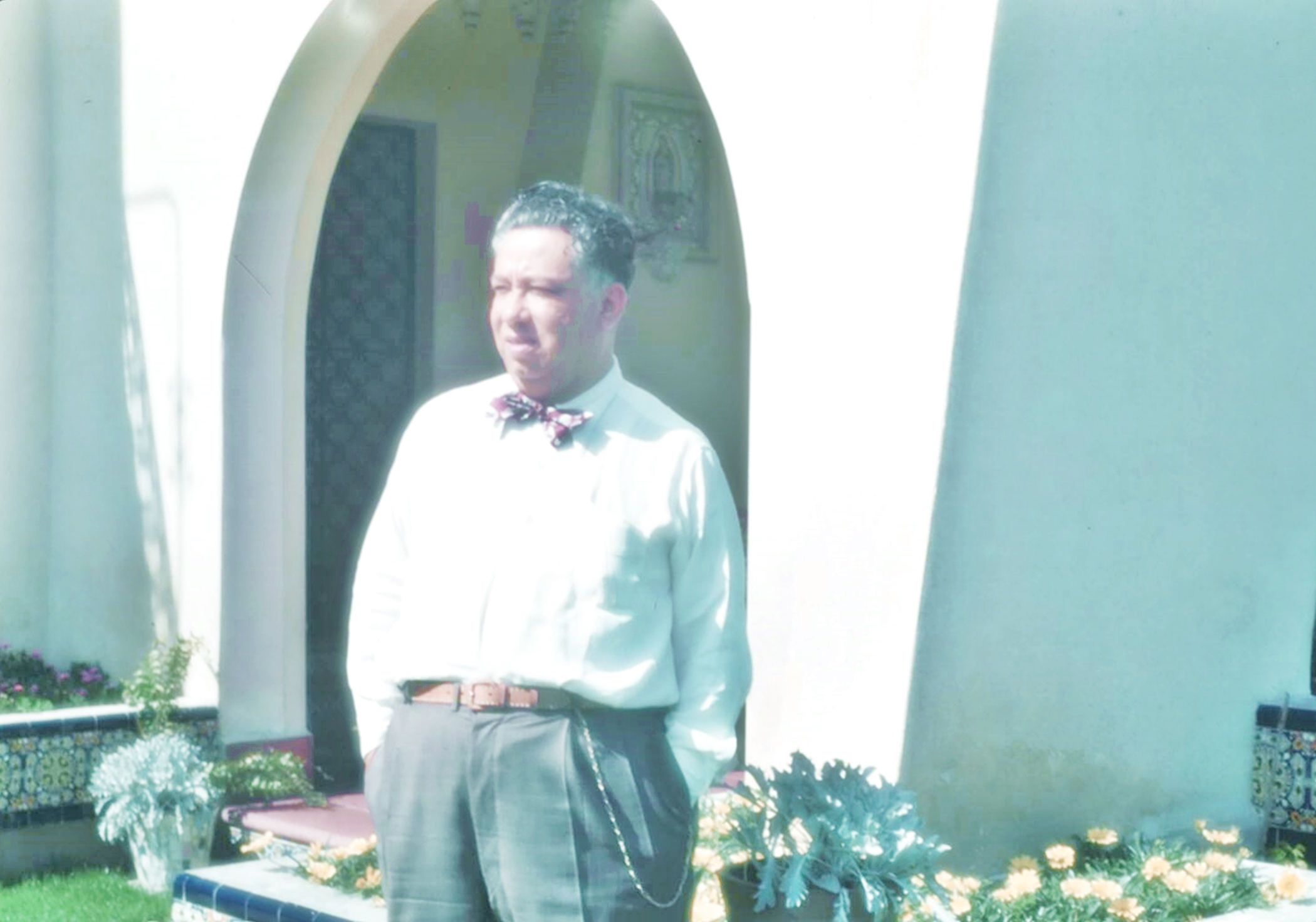 Fotografía del autor y compositor Joaquín Pardavé, tomada en 1951, en su casa de Av. Cuahtemoc y Concepcion Beistegui, en la Ciudad de México.